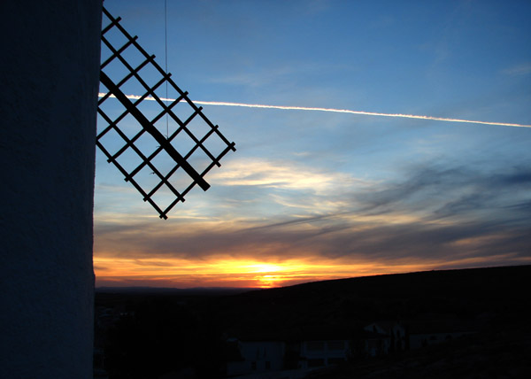 Puesta de Sol en los Molinos de Campo de Criptana